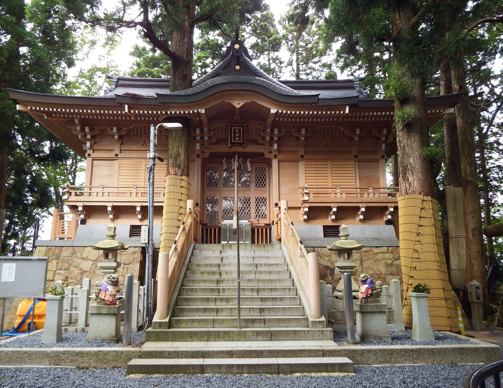 立里荒神社の本殿